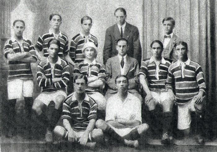 L'équipe de football du Clube de Regatas do Flamengo en 1914 avec le maillot cobra coral.